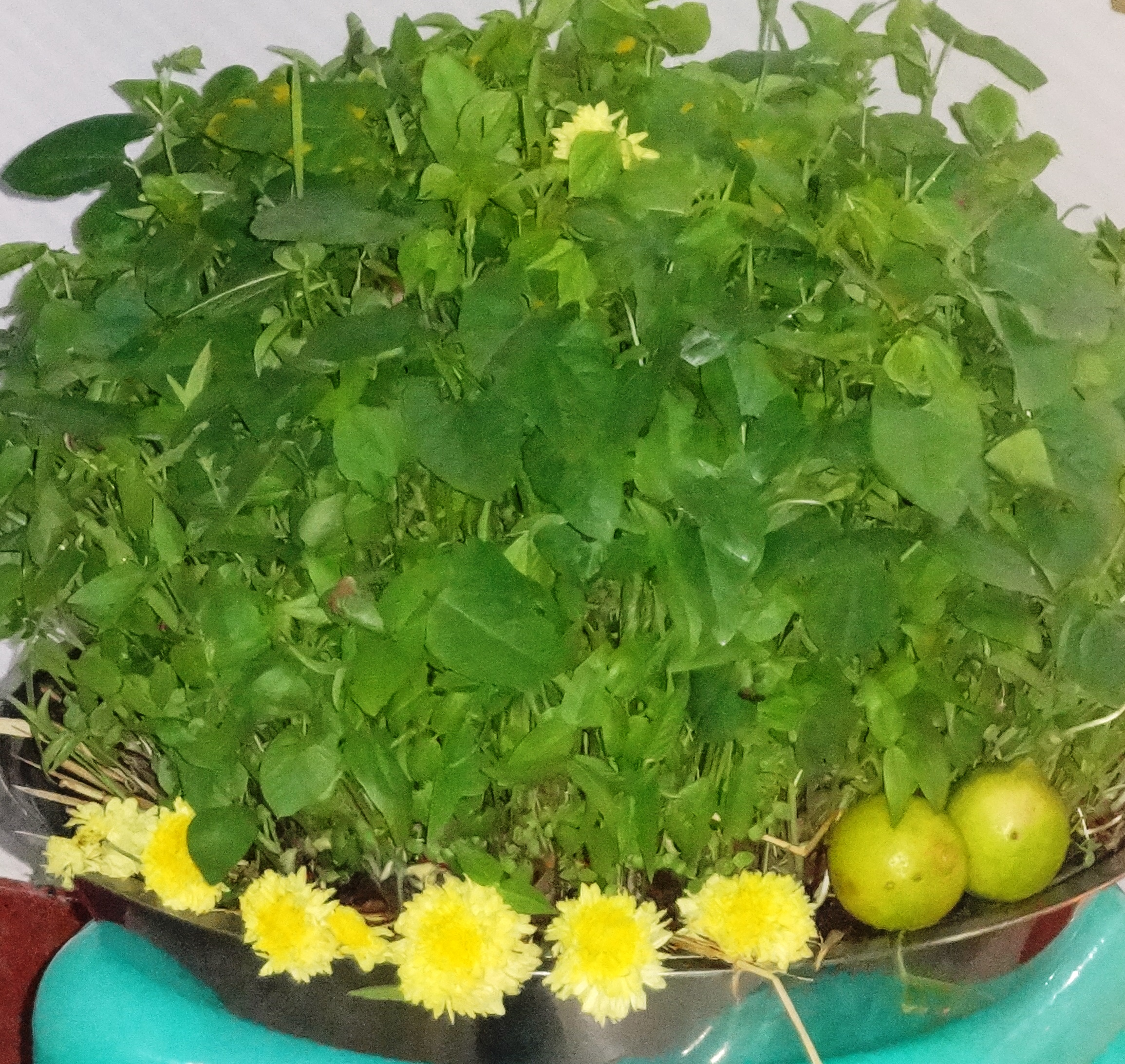 Mulaipari